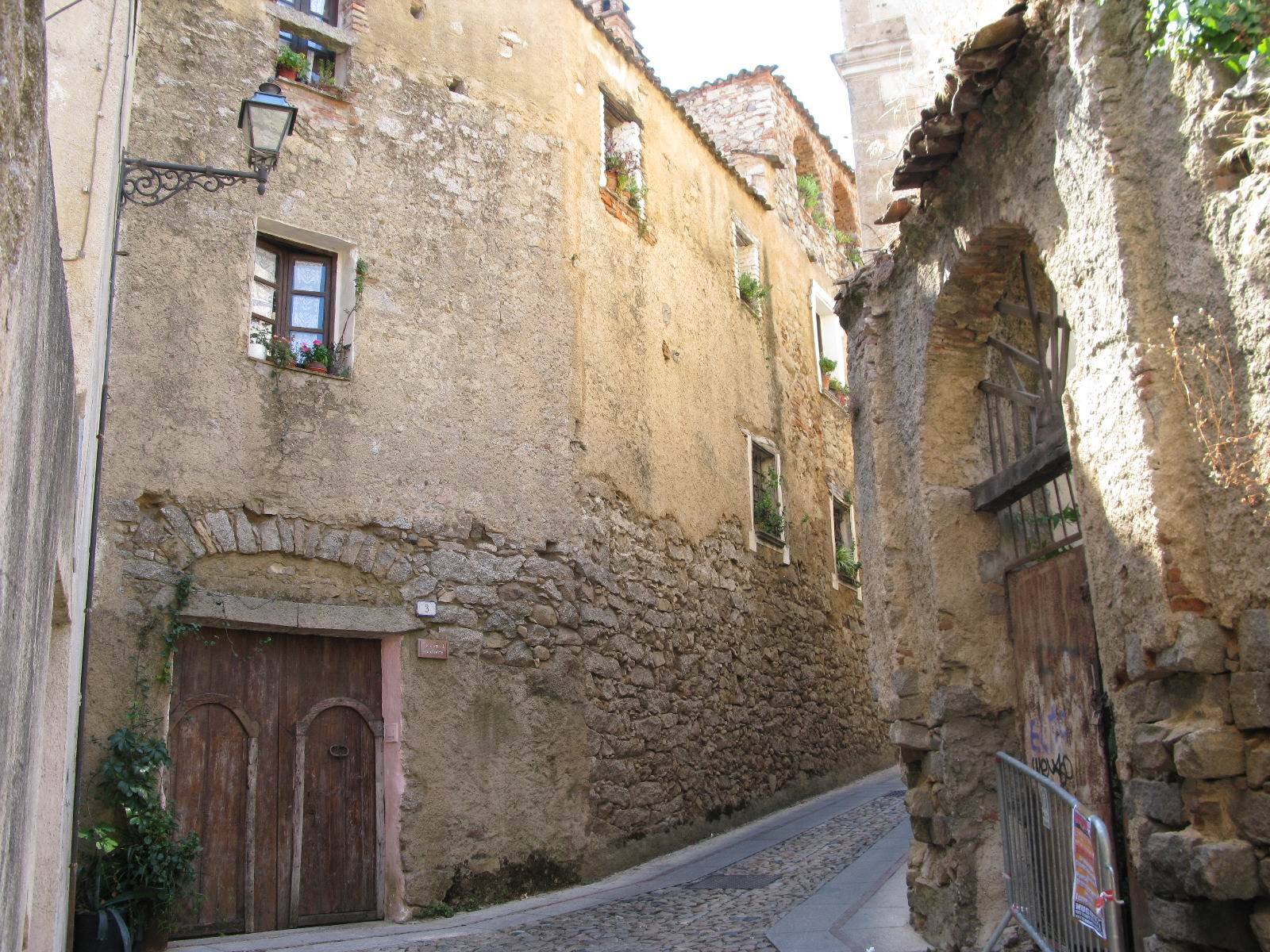 Nuoro - casa storica